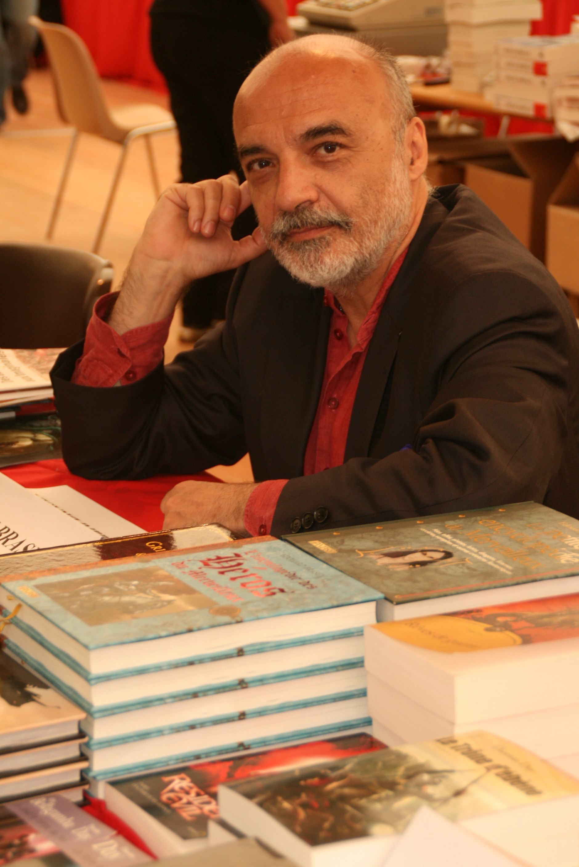 Edouard Brasey en séance de dédicaces